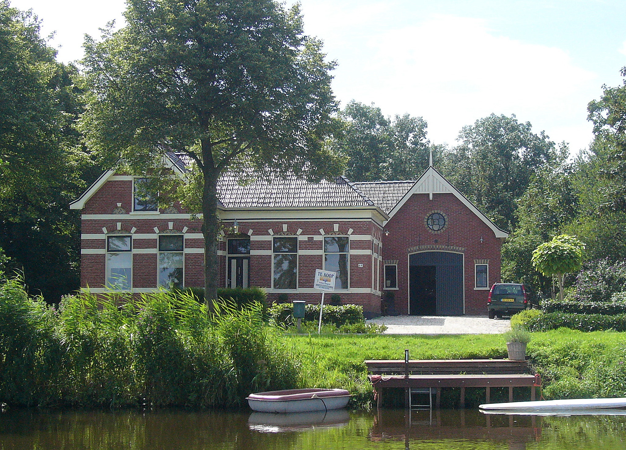 Commissionairswoning aan de zuidzijde van het Afwateringskanaal te Tjuchem. Gebouwd in opdracht van rentenierende boer Luursema in de eclectische stijl van rond 1900. Karakteristieke bouw met originele details en bijpassende modernisatie. Achtereenvolgens bewoond door families Luursema, Toxopeus, Van der Laan, Hester en Staal. Foto genomen juni 2011.